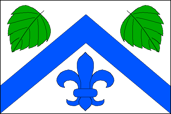 vlajka obce Březolupy